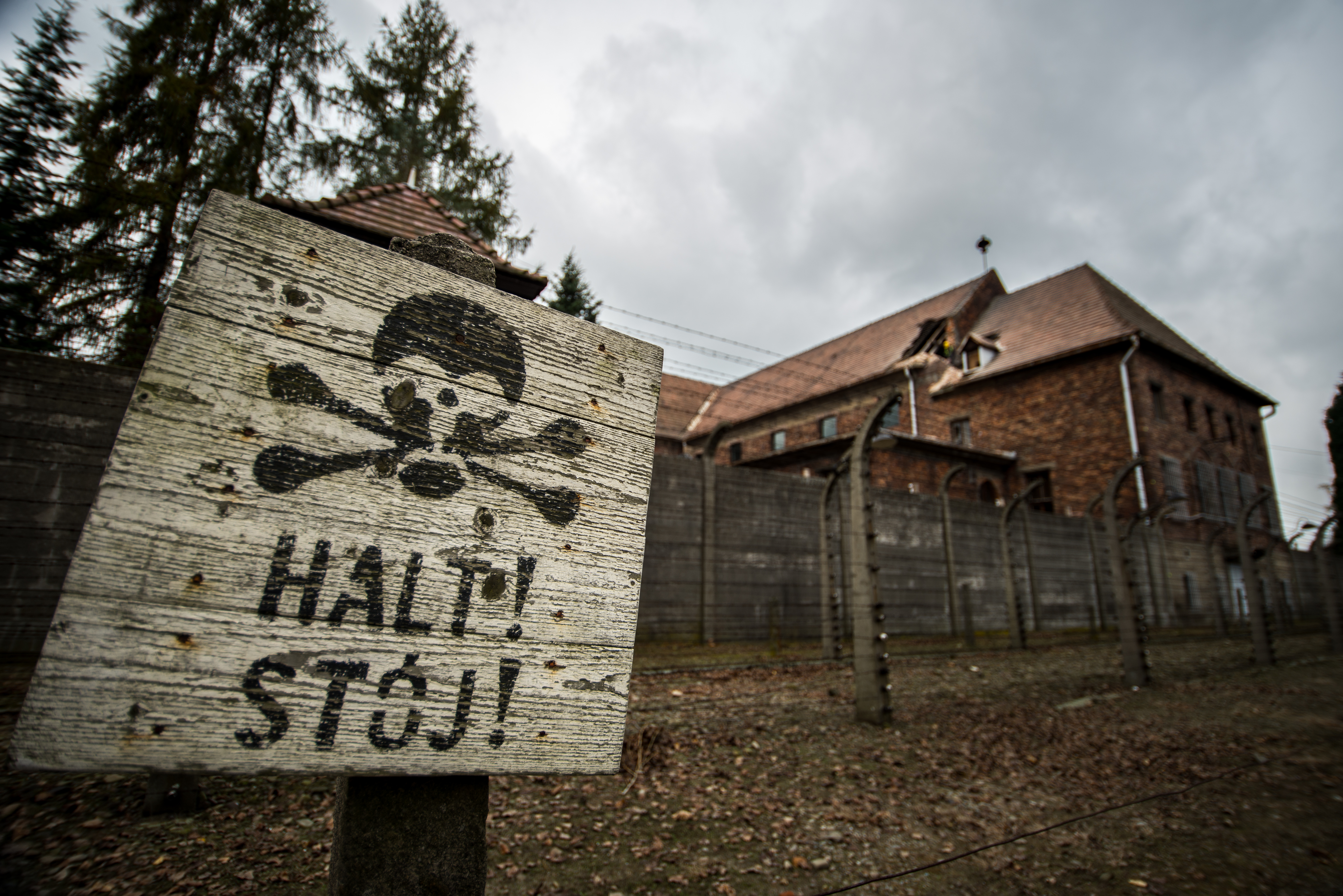 שלט HALT STOJ